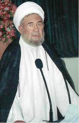 الشيخ محمود رضا فرحات: المدير العام السابق للمجلس الاسلامي الشيعي الاعلى- المتوفي في أيلول 2005